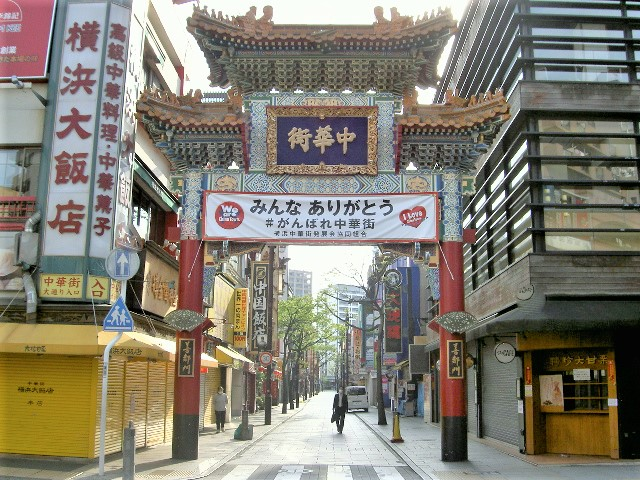 新型コロナウイルスで営業自粛中の横浜中華街